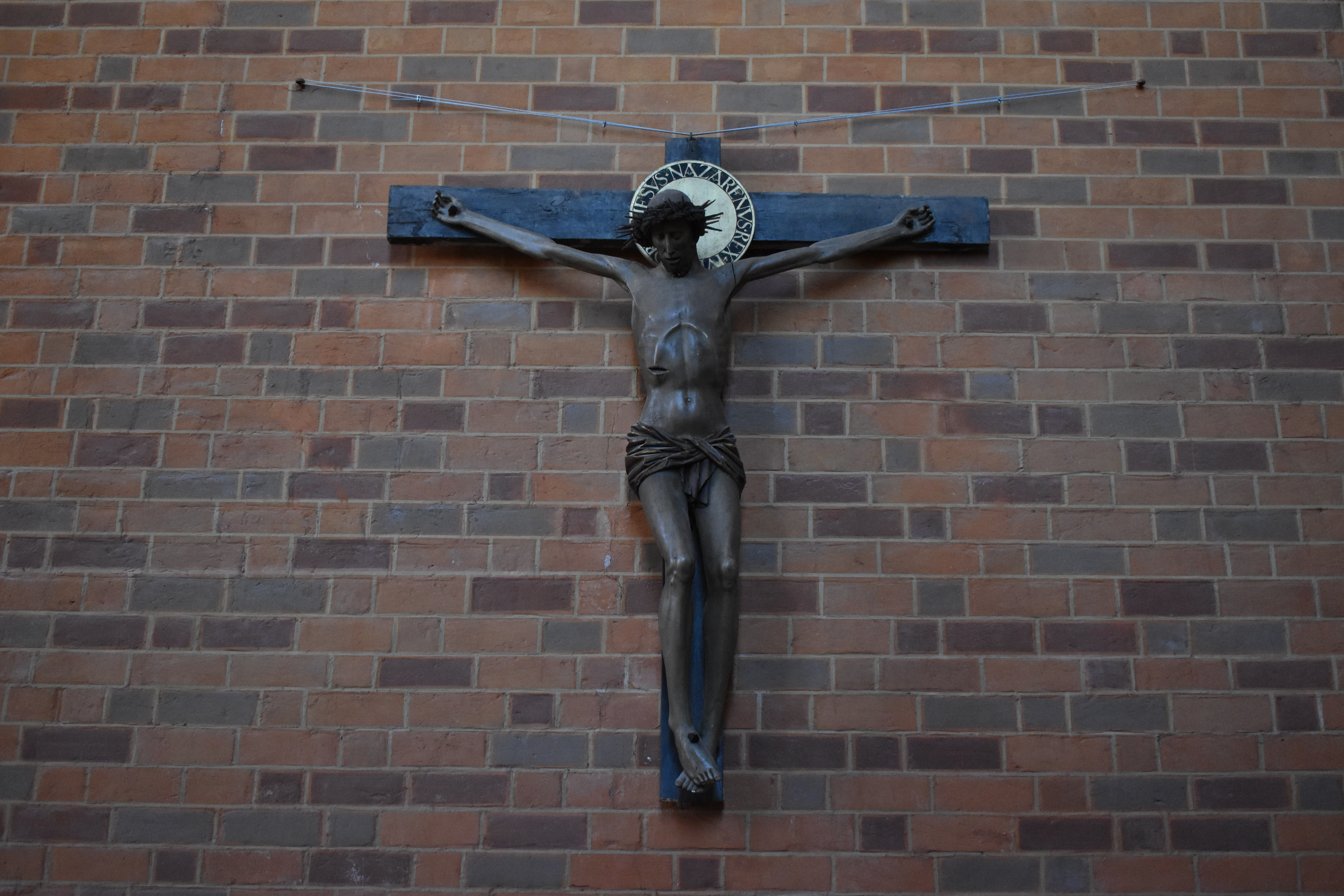 Kruzifix aus der Klosterkirche Neuruppin. Hat ehemals in Siechenkapelle St. Lazarus gehangen; Entstehung um 1500.